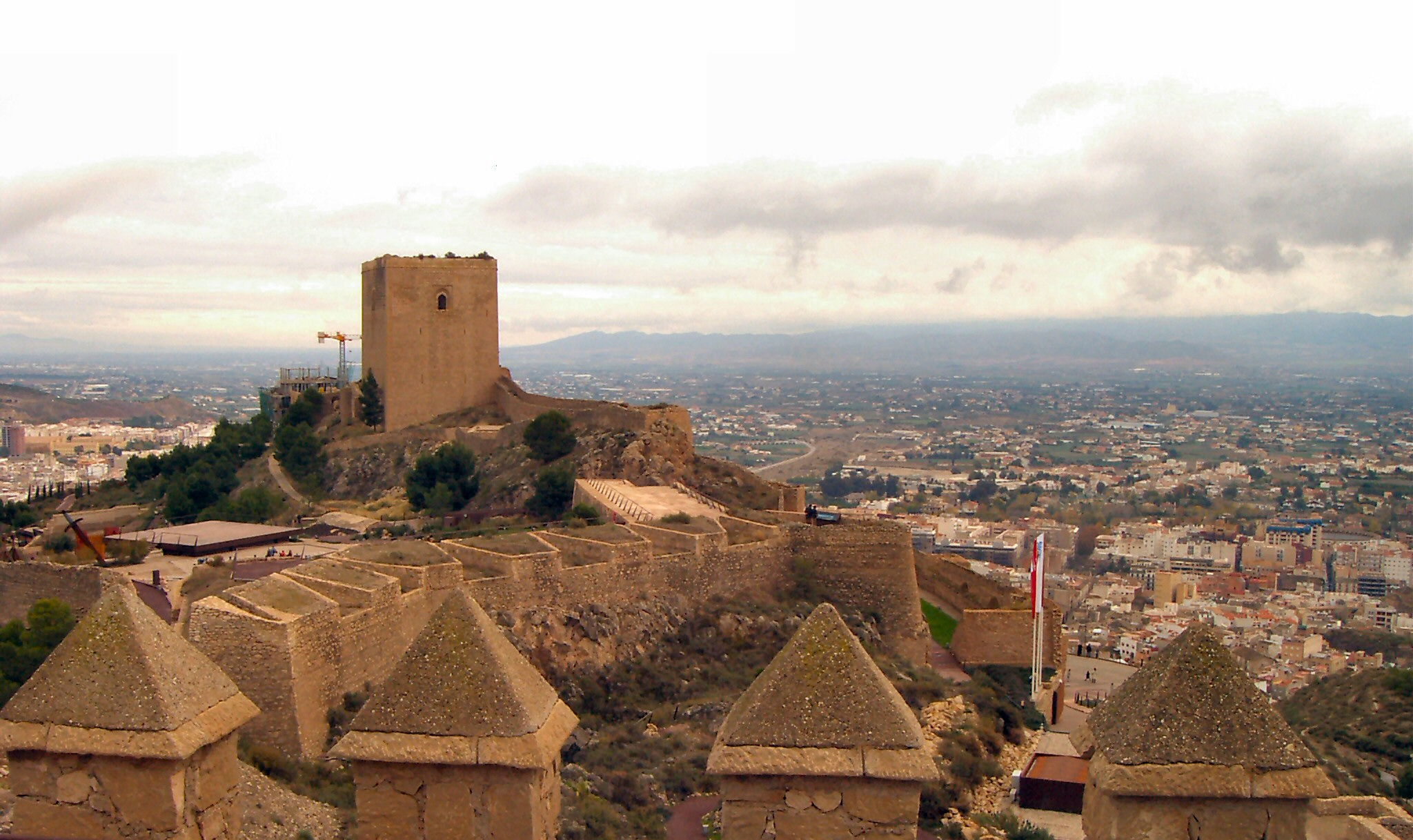 Castillo de Lorca. Torre Alfonsina